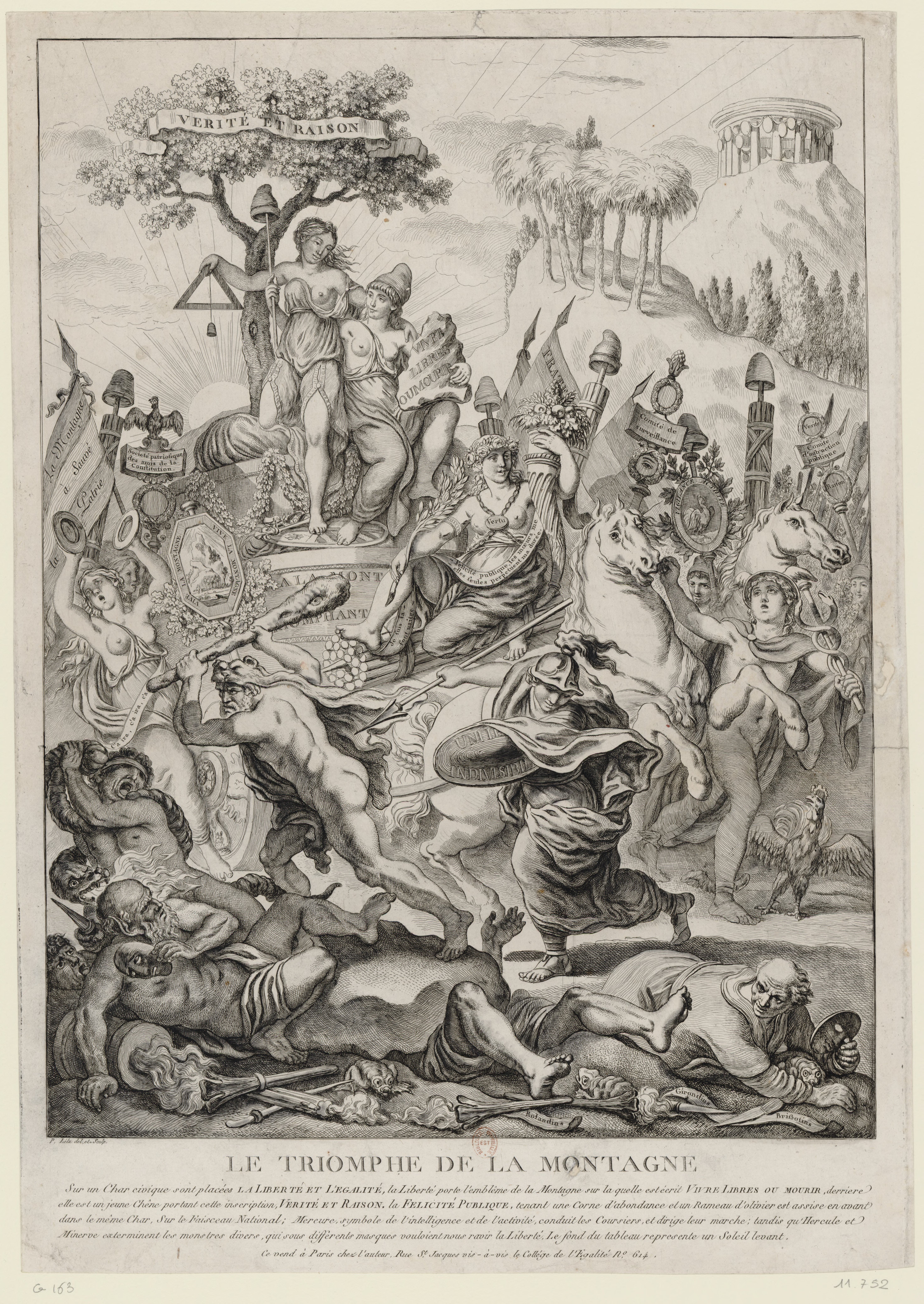 Le Triomphe de la montagne, estampe de Pierre Lélu, 1793.